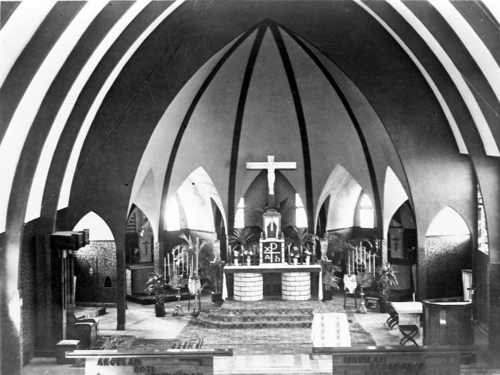 Negatief. Kerk te Ndone, Flores